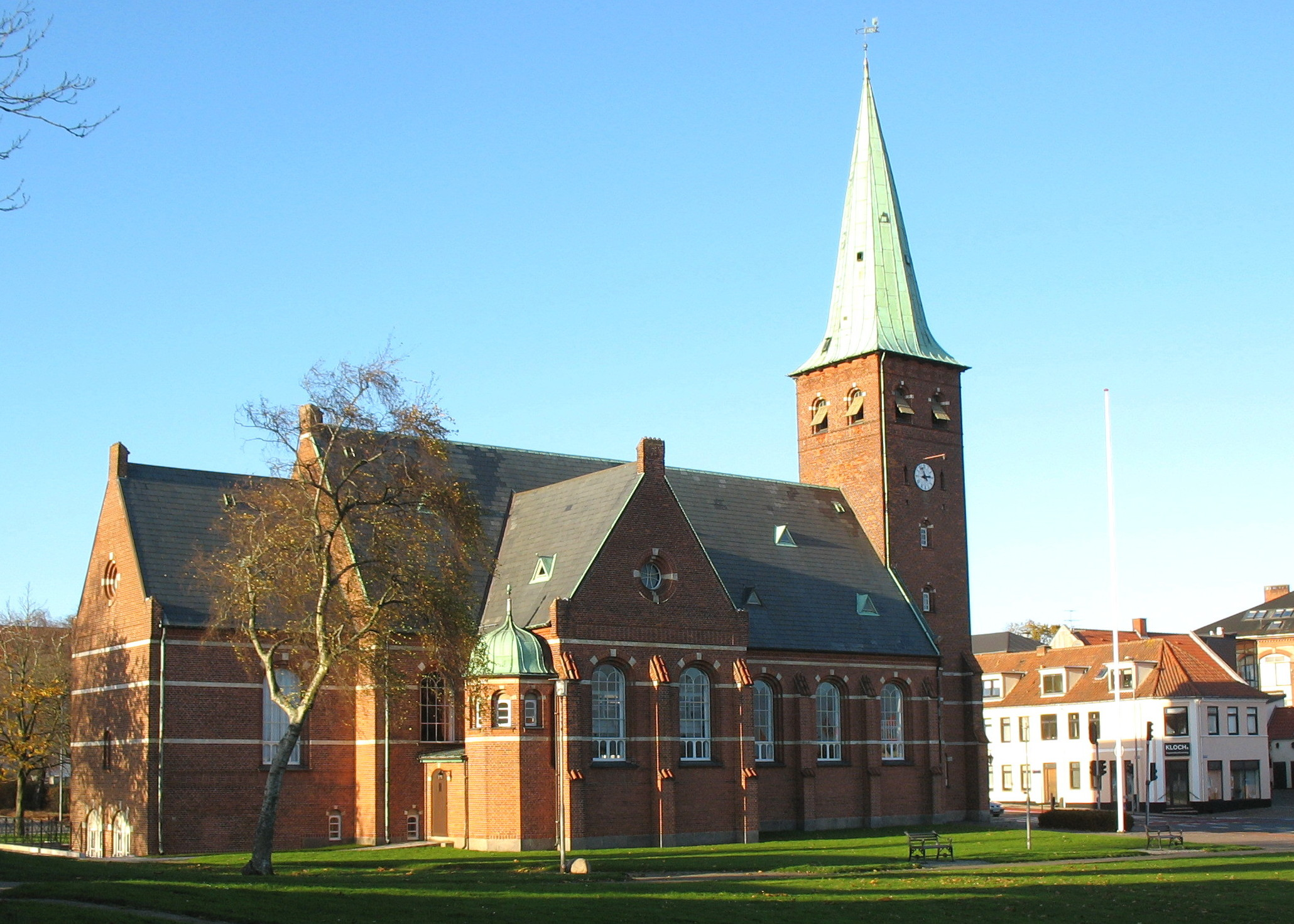 Skive Kirke.